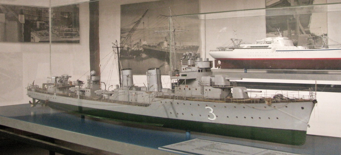 Maketa ratnog broda "Zagreb", Split, 1938, Hrvatska. Tehnički muzej u Zagrebu. Autor makete: Miljenko M. Sindik